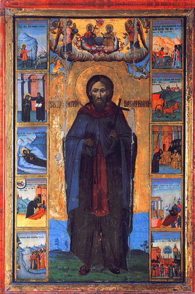 Преподобный Димитрий Басарбовский